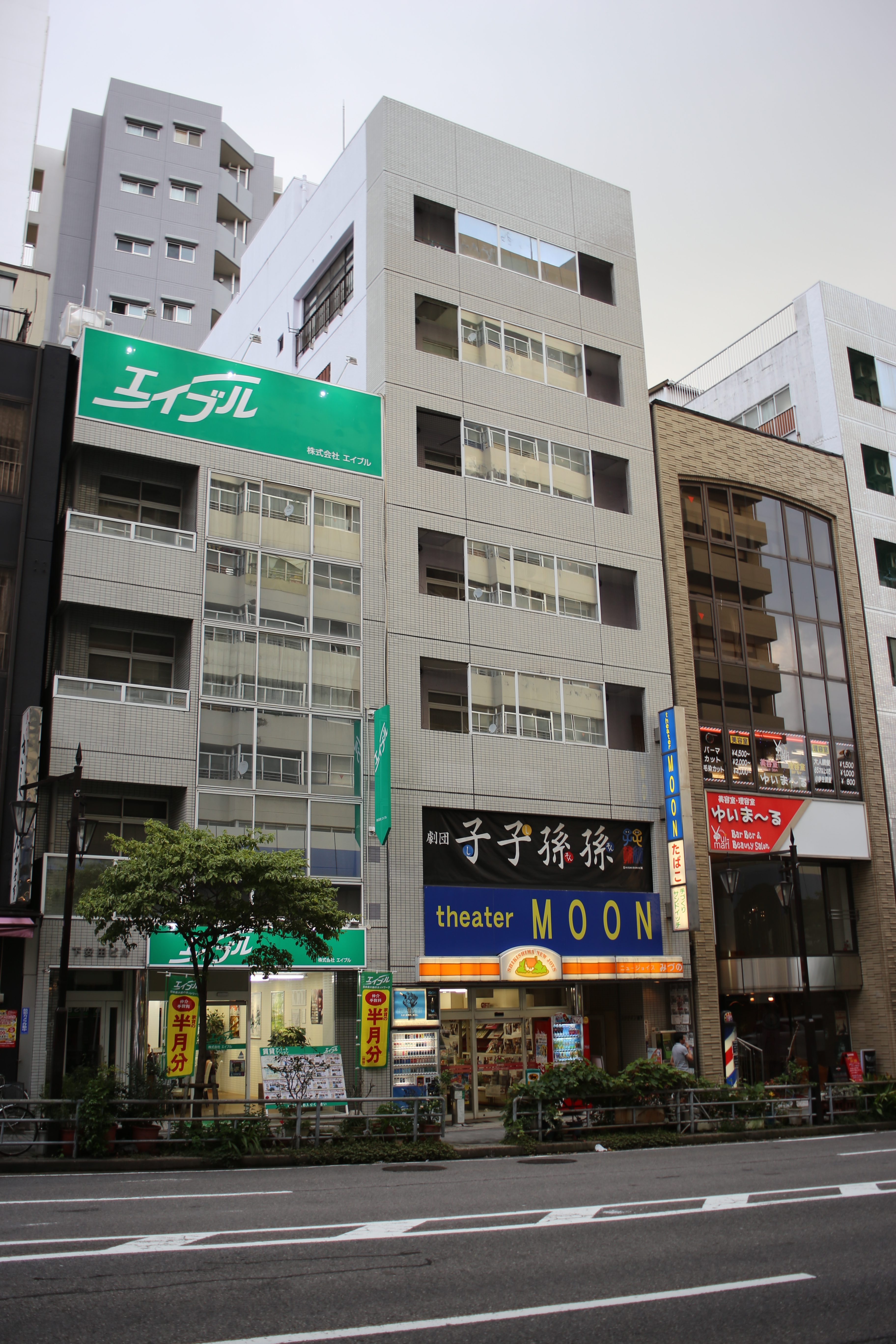 名古屋市千種区池下一丁目のクリアレイズ本社が入居するスタチオン池下を東側公道南側より撮影